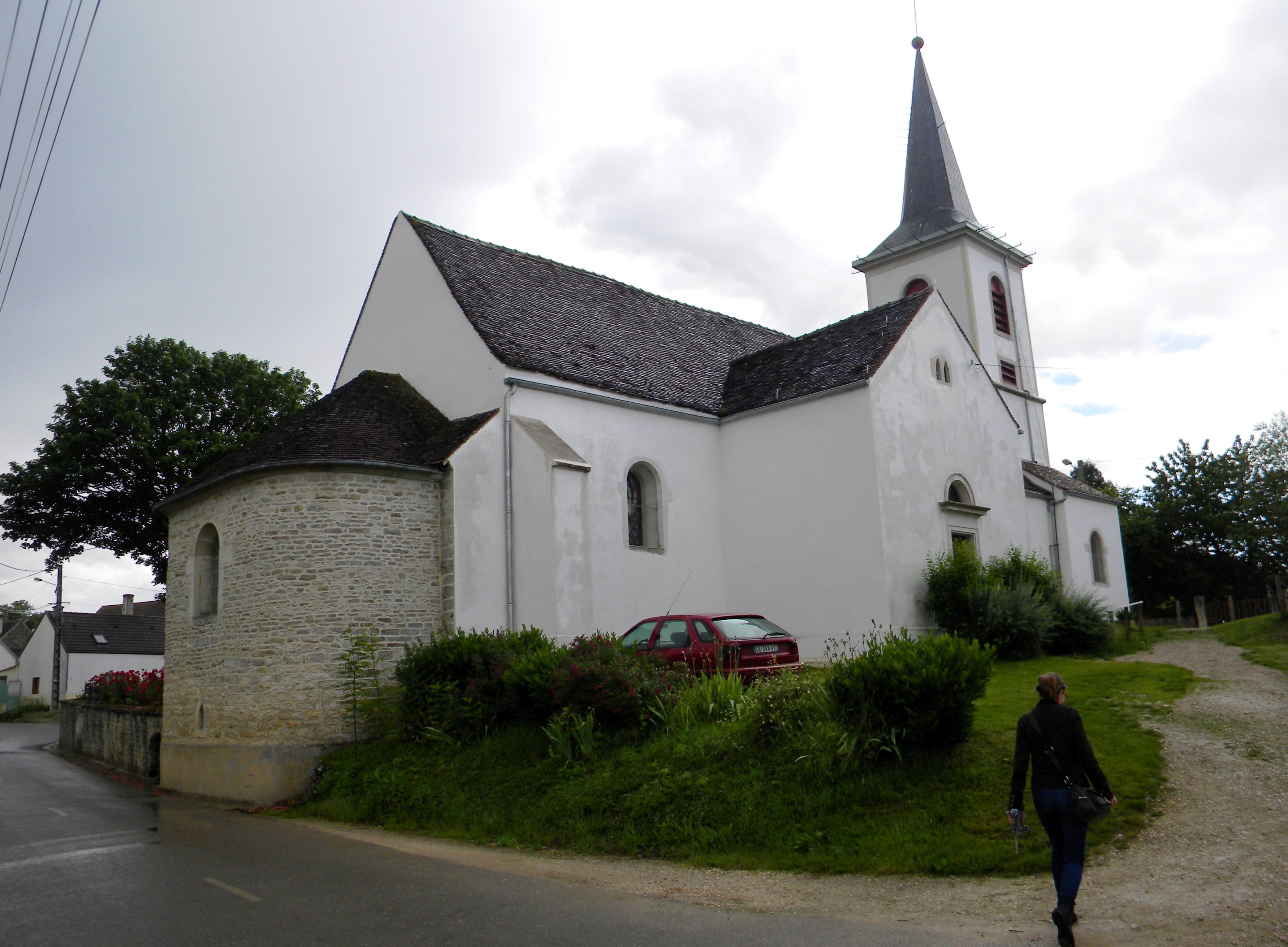 Preĝejo de Viévigne